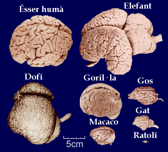 Comparació dels cervells de diferents mamífers